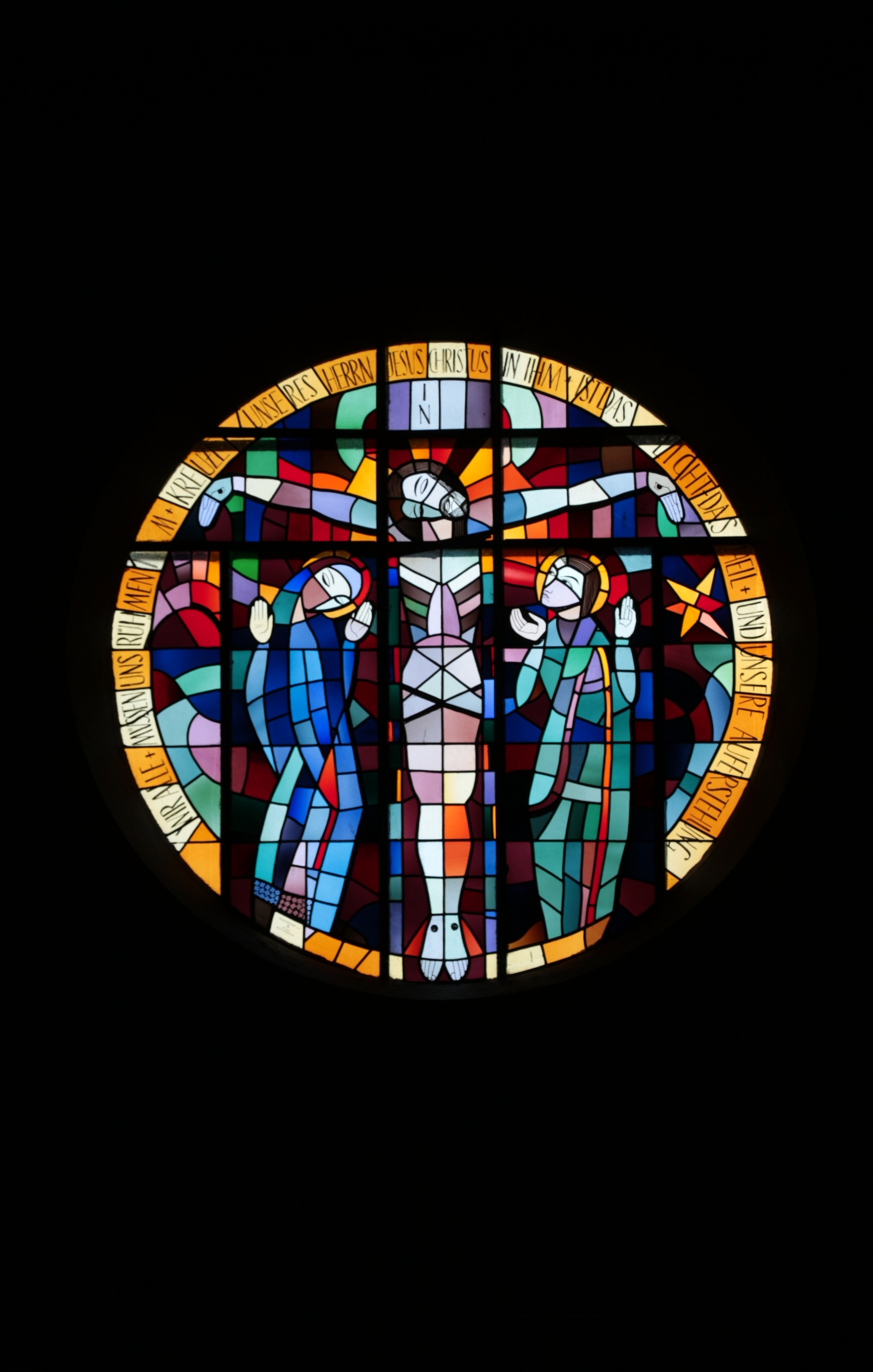 Pfarrkirche St. Josef, Bürmoos, Bezirk Salzburg-Umgebung, Land Salzburg; geweiht 12. August 1956